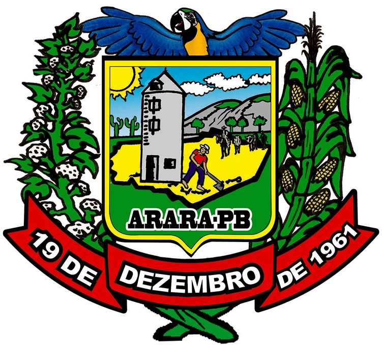 Brasao arara pb